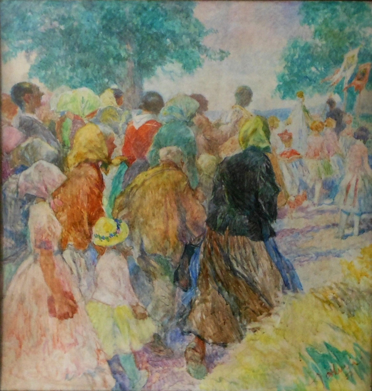 Oldřich Cihelka: Procesí. Tempera 105 × 110 cm, 1934.